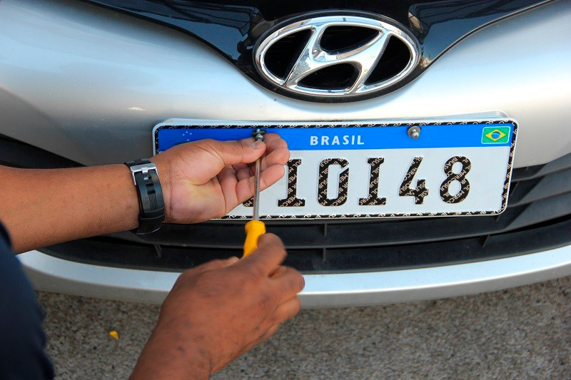 Início da Implementação da nova placa automotiva no Brasil em 2018, padrão Mercosul.